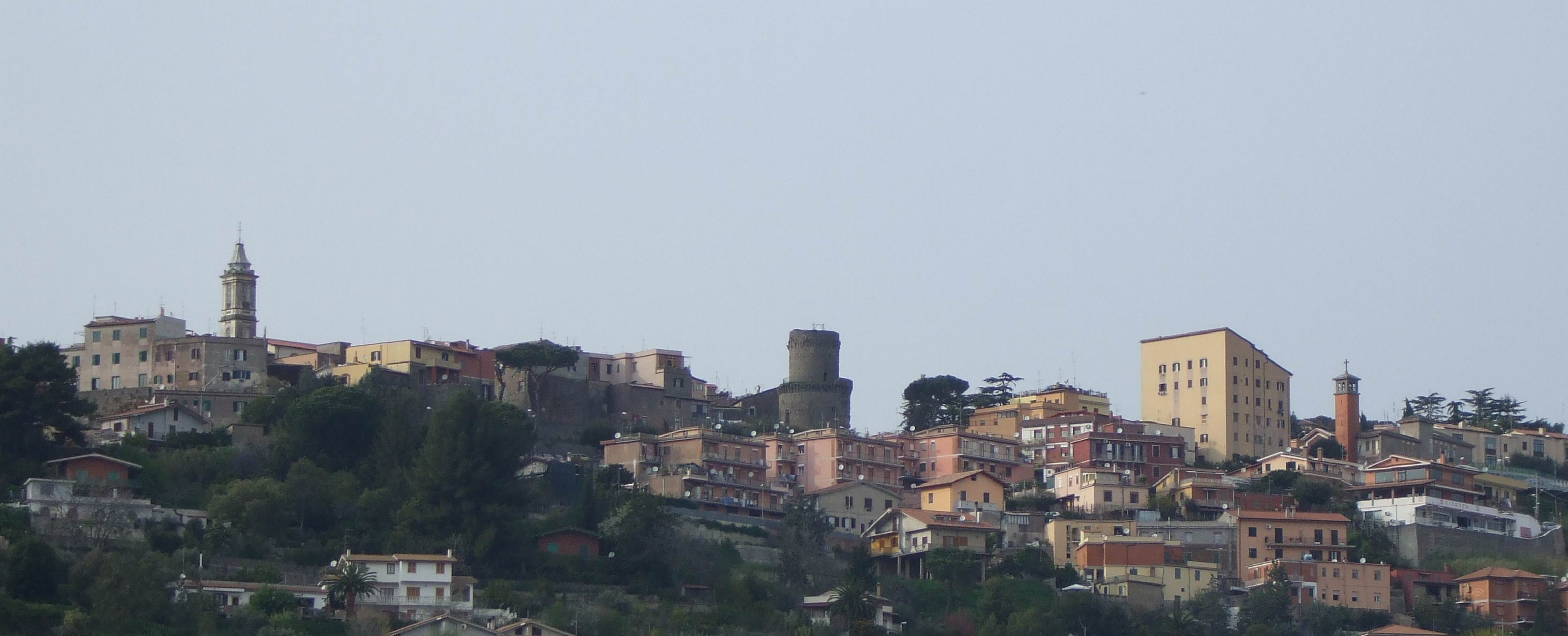 Lanuvio centro, particolare